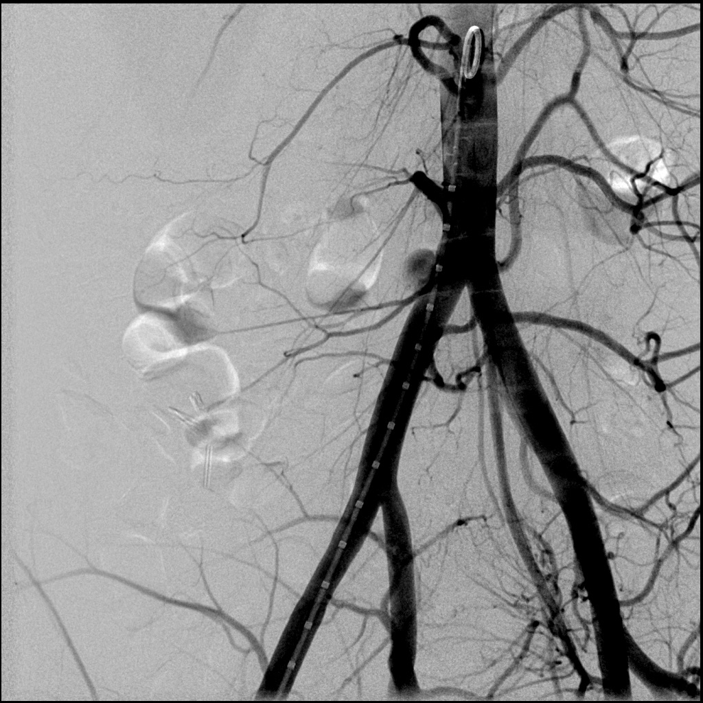 Angiografía del sector aortoiliaco que muestra un pseudoaneurisma en origen de iliaca primitiva derecha. Se trata de una imagen tomada en la Sección de Angiorradiología del Hospital Clínic de Barcelona